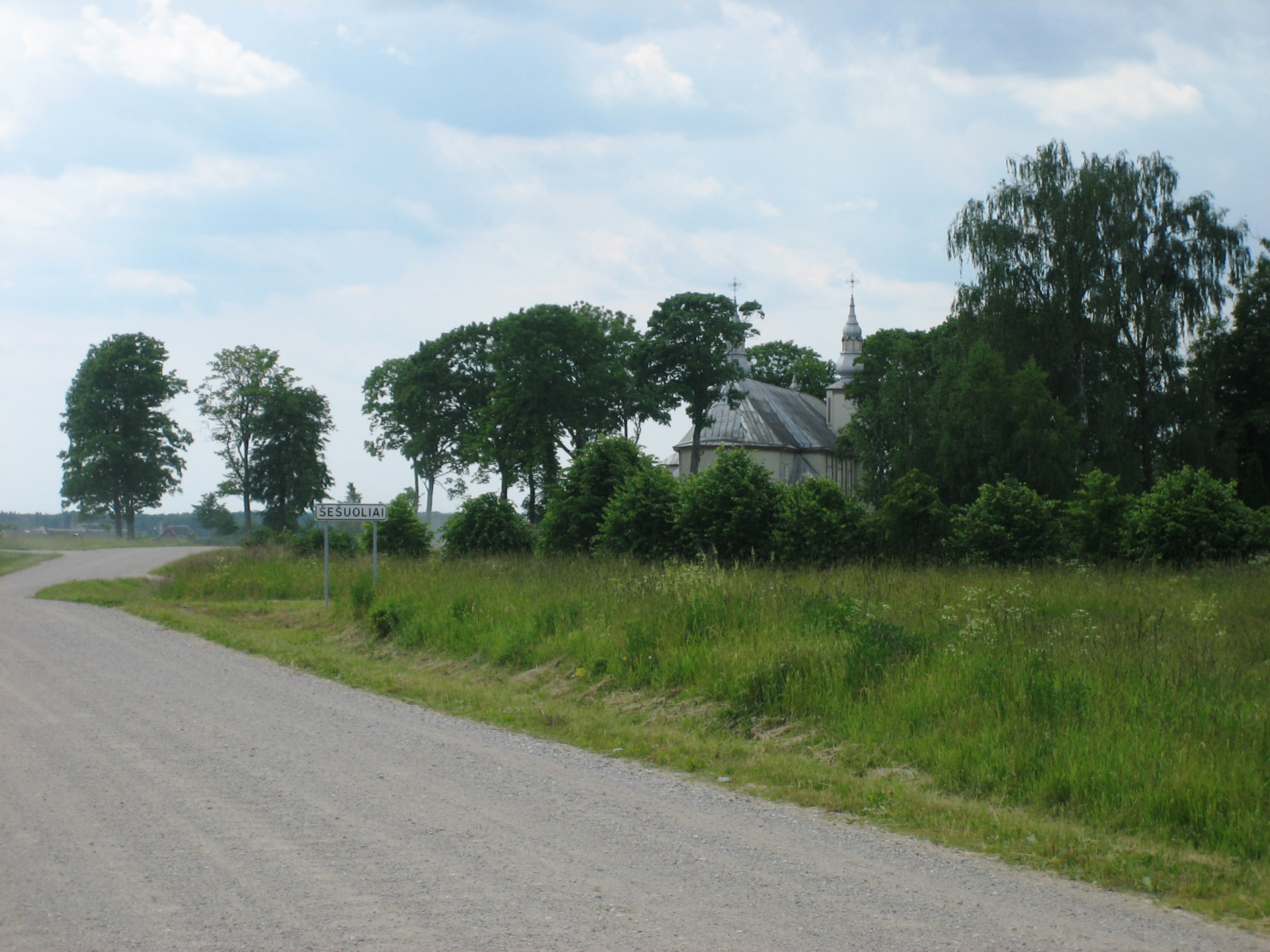 Šešuoliai